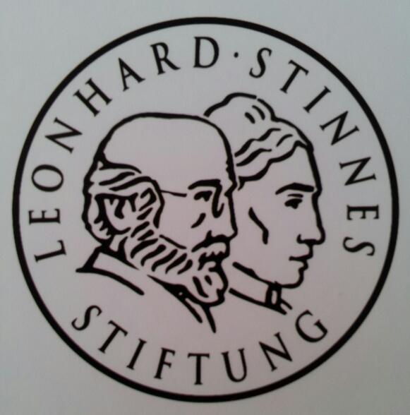 Das Siegel der Leonhard-Stinnes-Stiftung, gegründet 1904 in Mülheim an der Ruhr